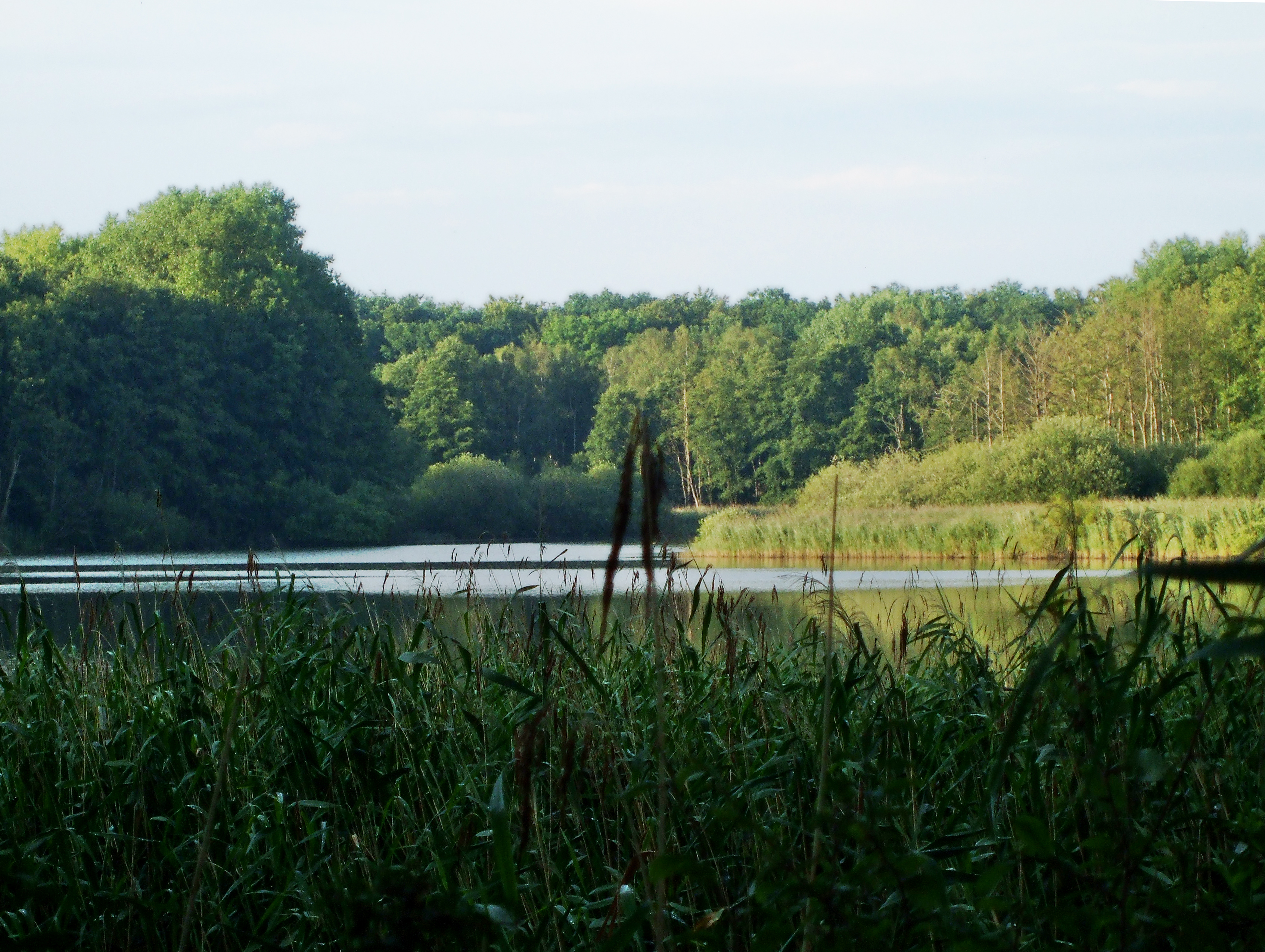 Nordostufer mit Schilfzone